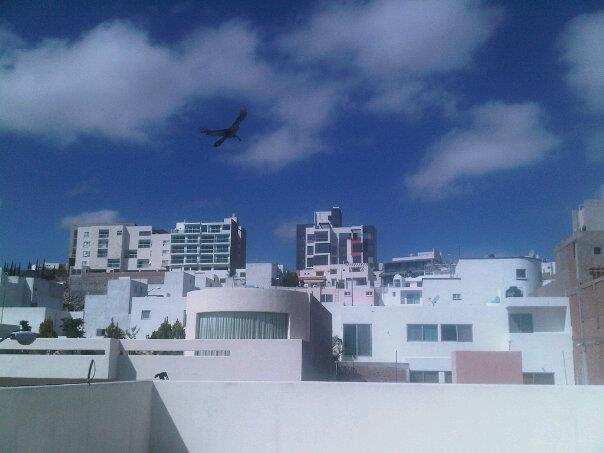 Casas en San Luis Potosí, México